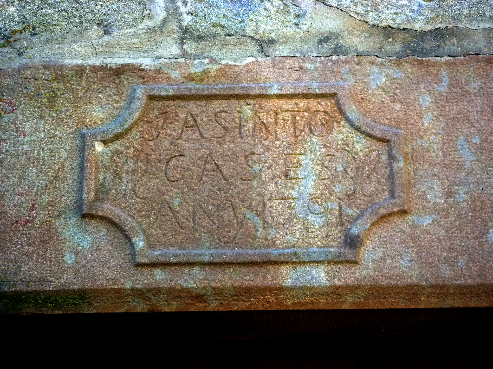 Mas Guillons (Torà): inscripció sobre la porta